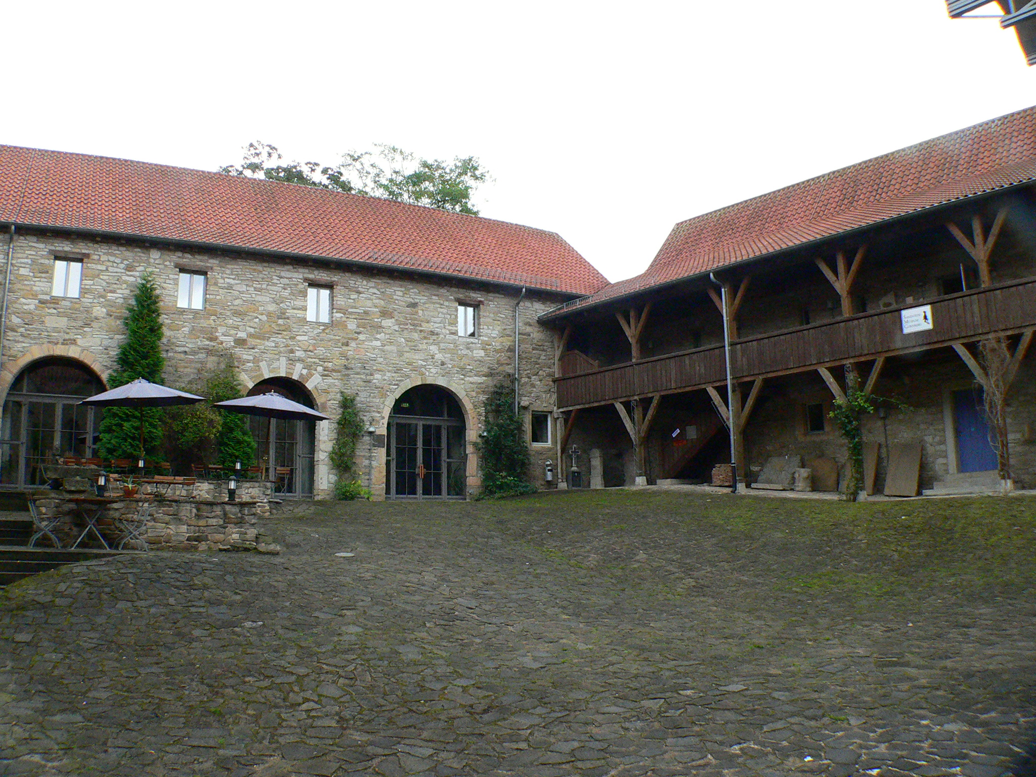 Kloster Cornberg, Hessen, Deutschland - Innenhof